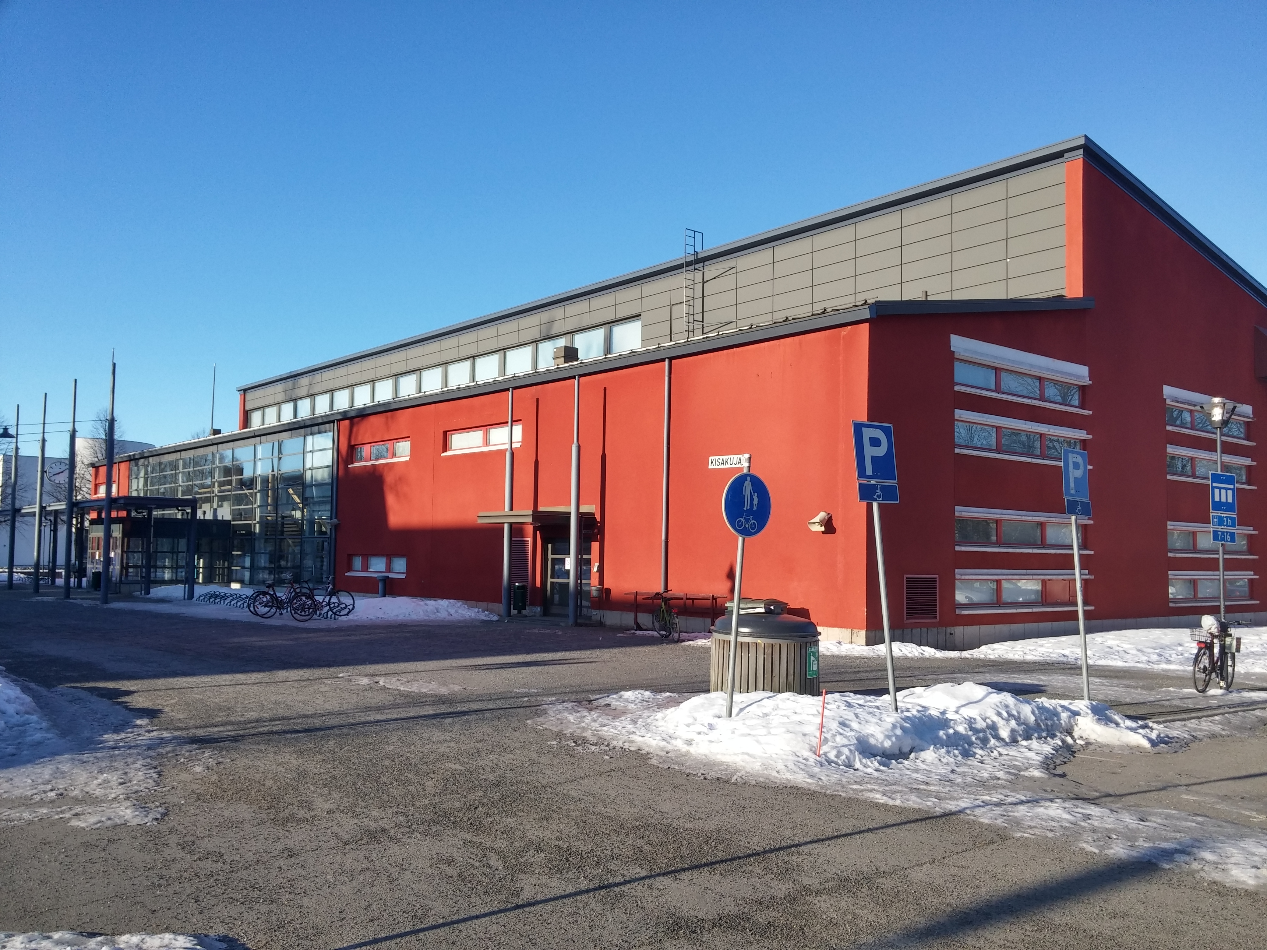 Joensuun urheilutalo